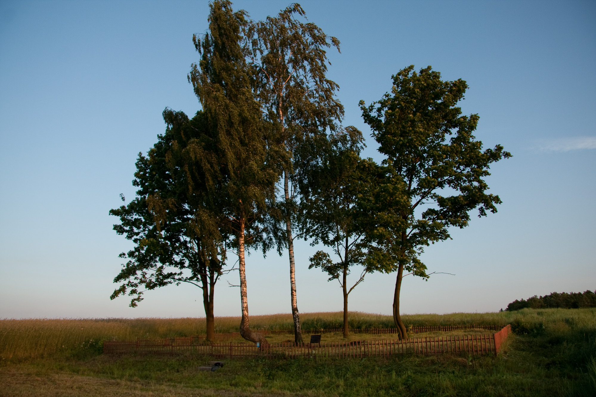 Cmentarz wojenny niemiecki z czasów I Wojny Światowej. Józefowo 12.1991.